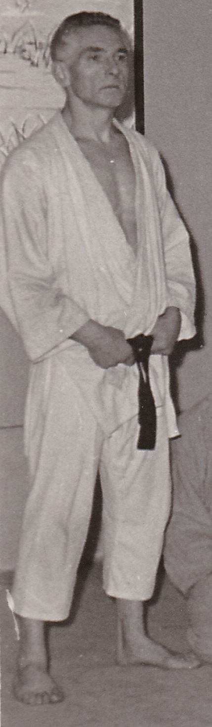 Cliché de Jean Andrivet, professeur de judo au Cercle sportif de Jiu-Jitsu du Mesnil